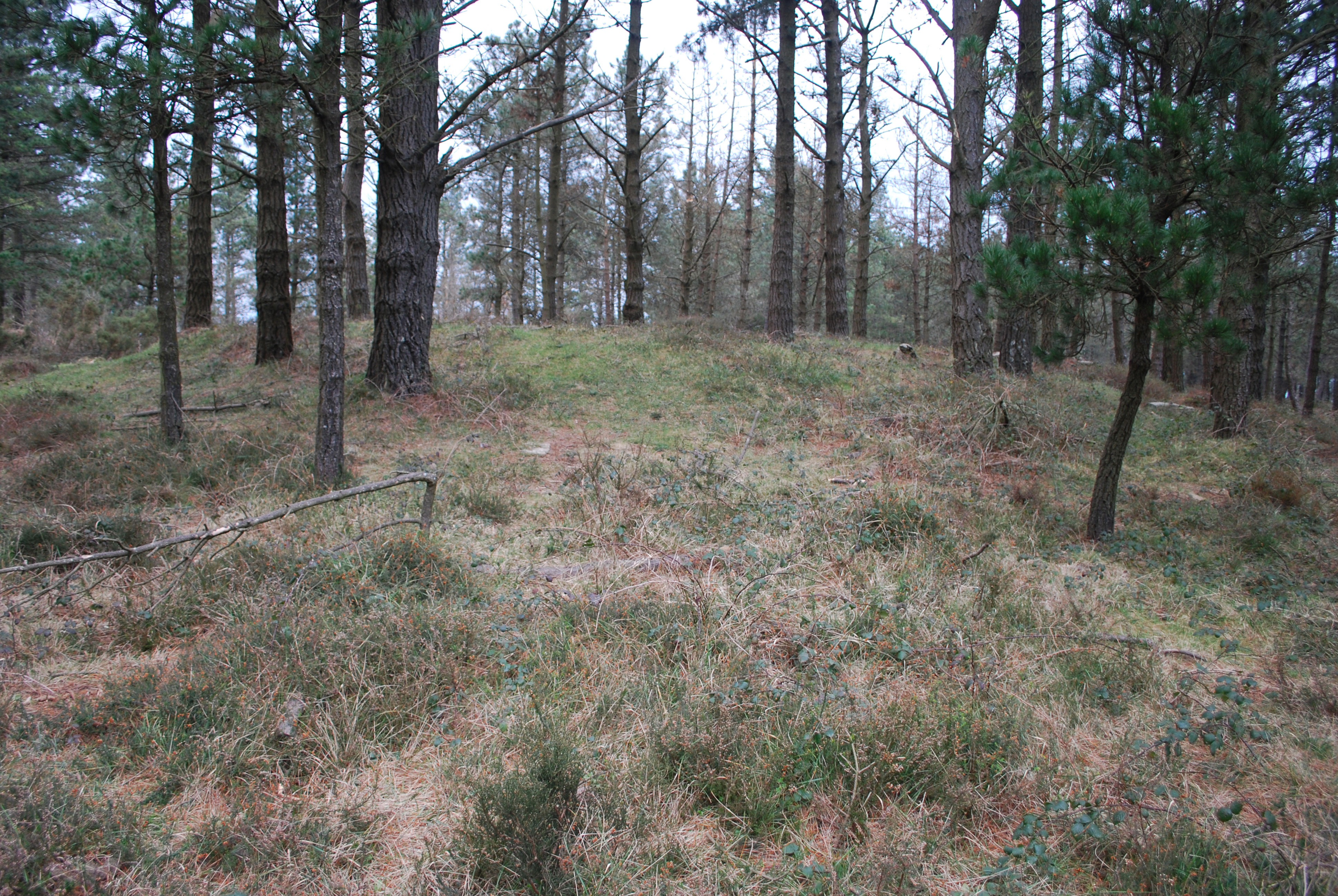 Mámoa no Monte Xalo Culleredo A Coruña Galiza Spain